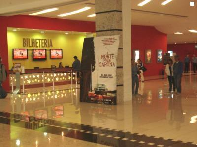 Vista do foyer do Cine Roxy de São Vicente, SP